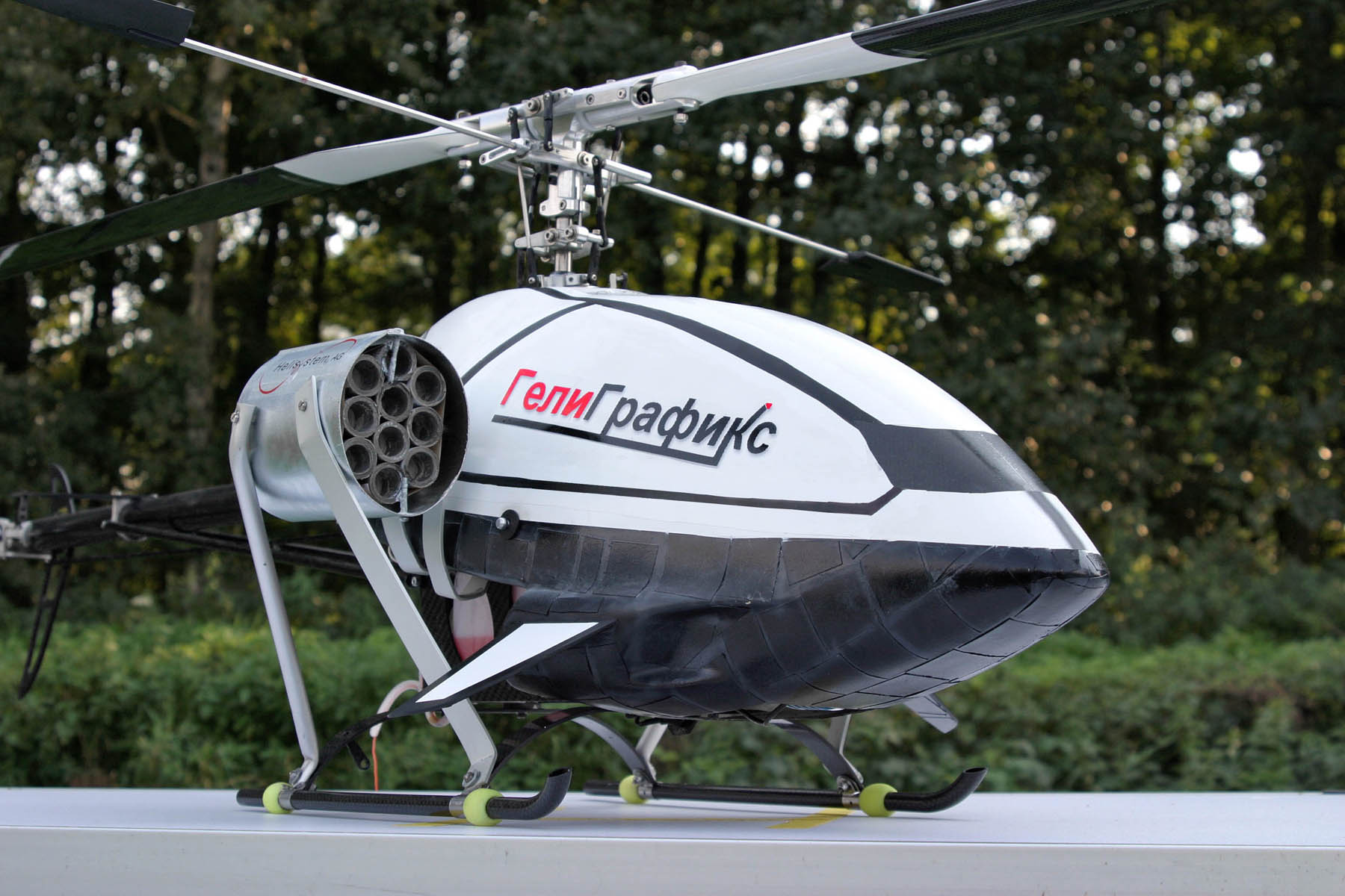 Das Foto zeigt den ersten raketengetriebenen RC-Helikopter der Welt